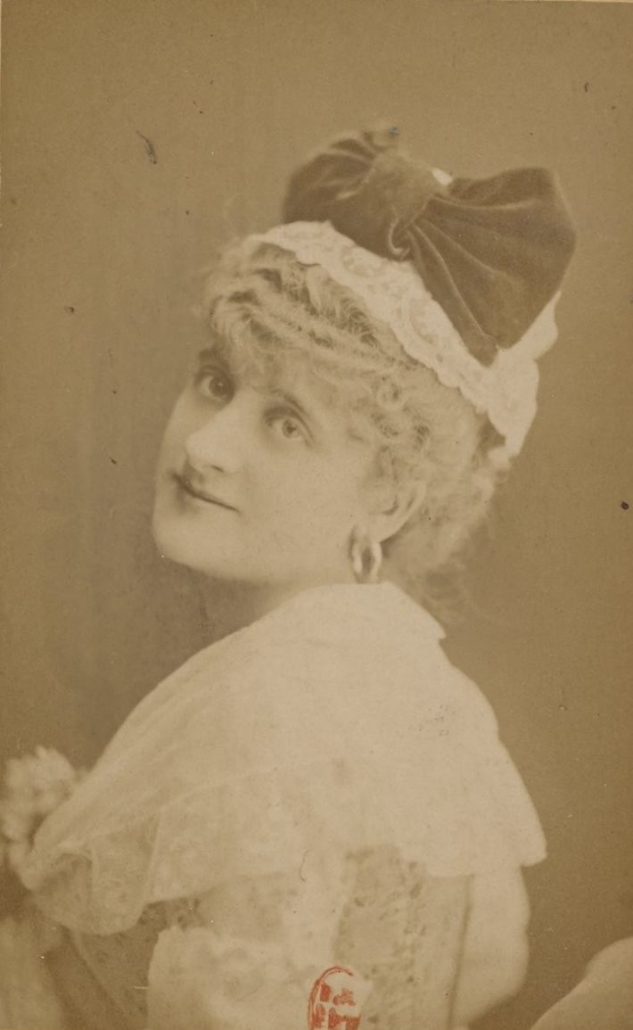 Conchita Gélabert par Nadar (Recueil Célébrités du XIXe siècle. tome X)